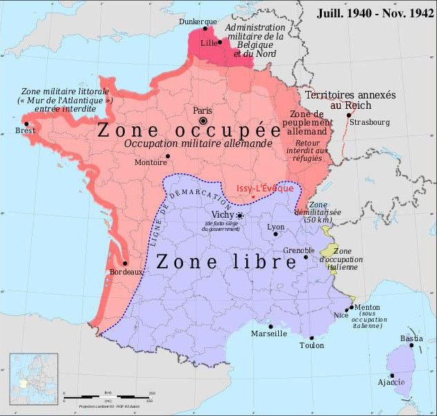 Carte de la France divisée de juin 1940 à novembre 1942 entre zone occupée et zone libre, avec l'emplacement du village d'Issy-L'Évêque, Saône-et-Loire.